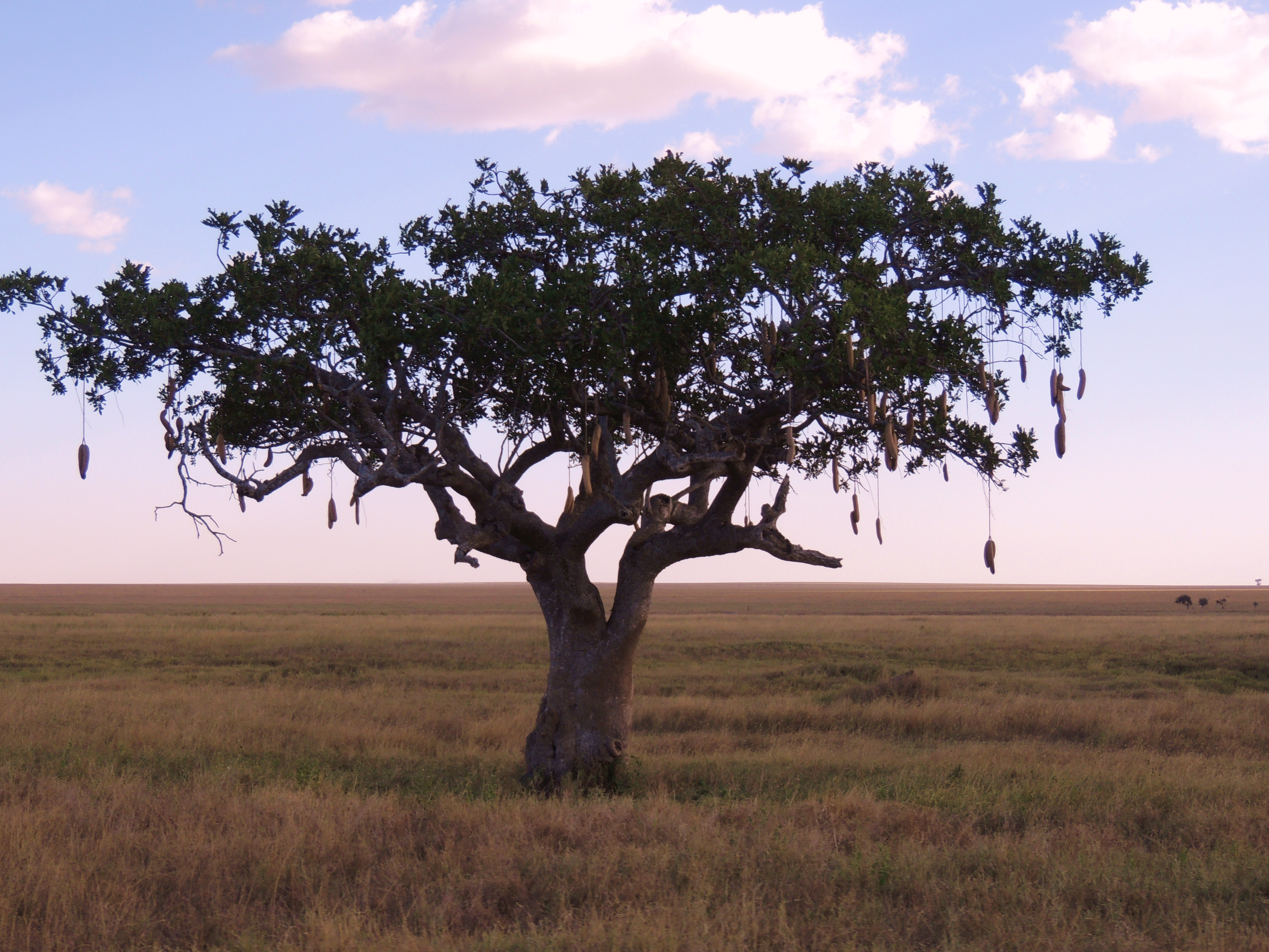 Kigelia africana - Sausage-tree